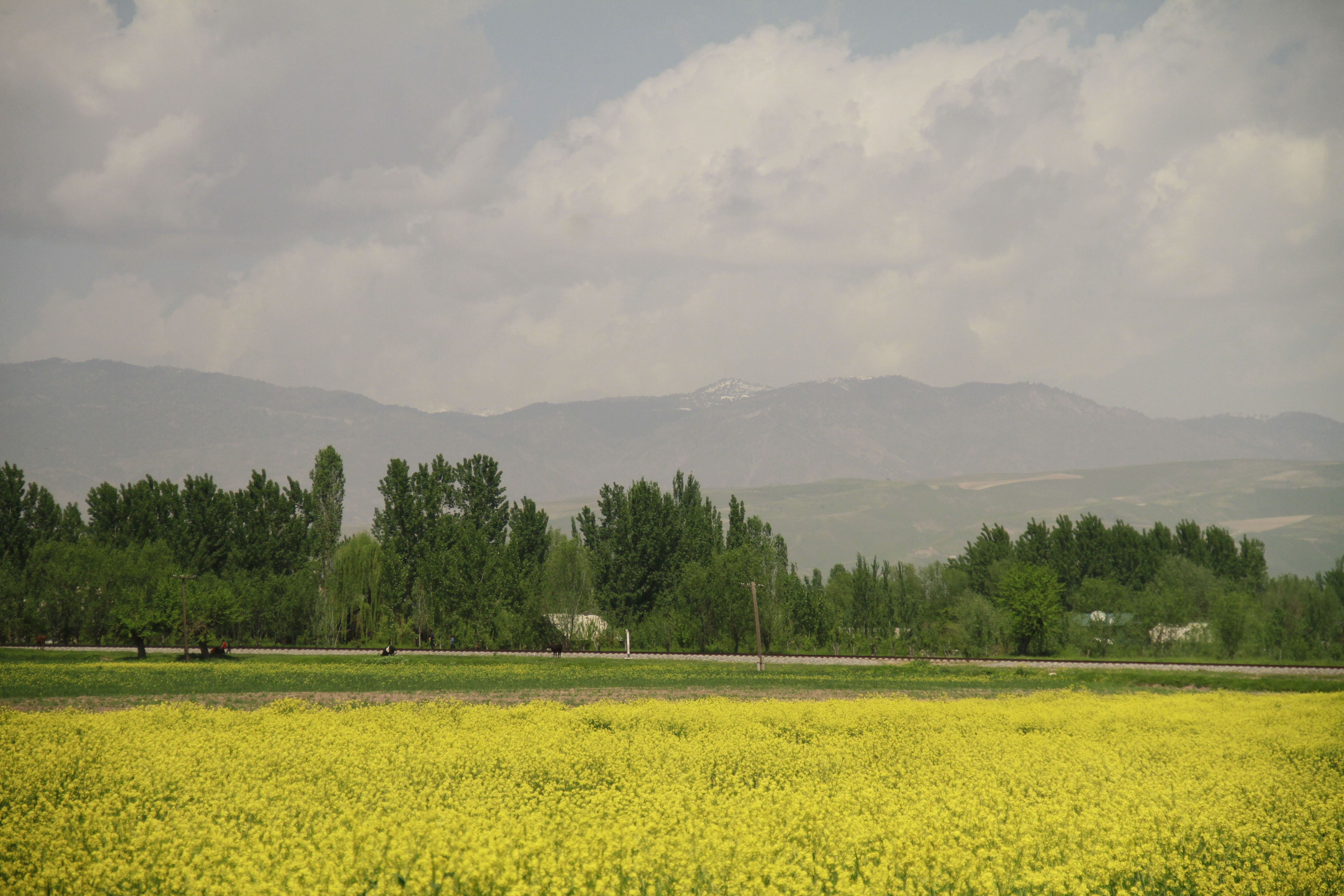 Тоҷикӣ: Ш. ҳисор, д. Дурбат (4)